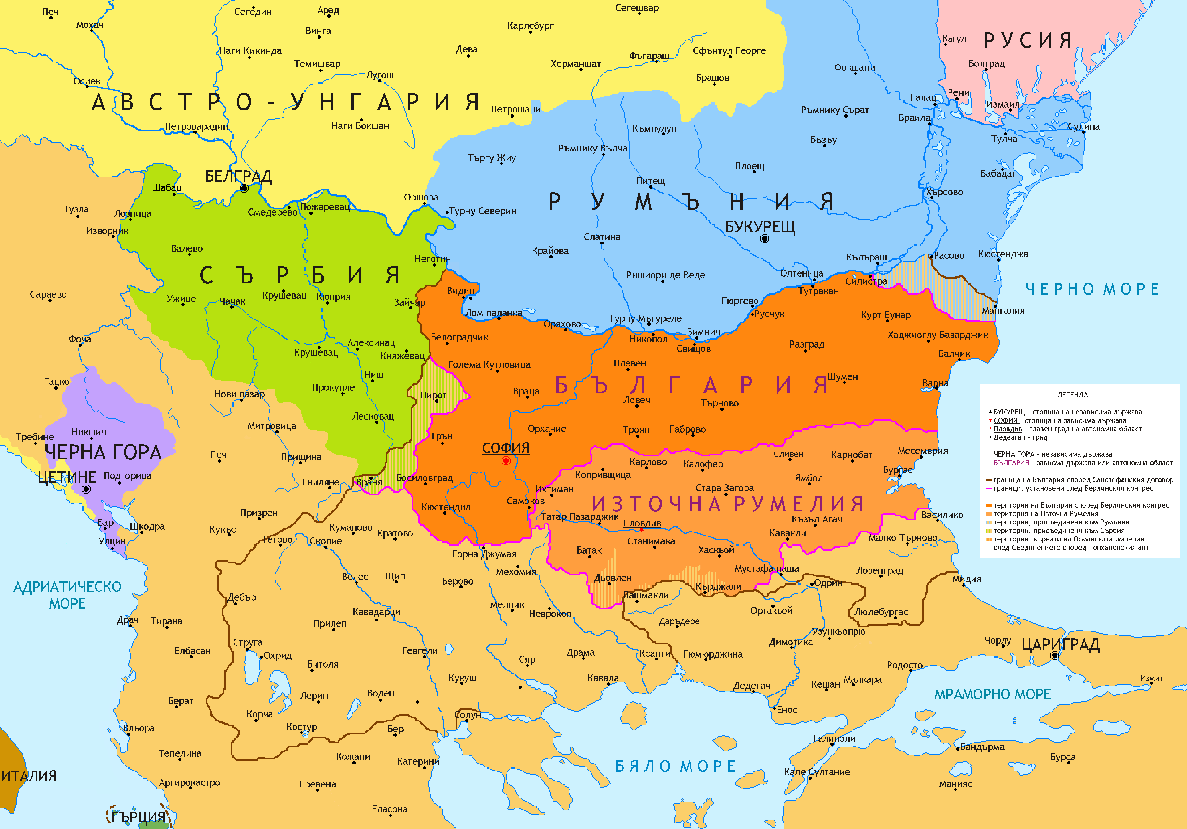 България след Берлински конгрес